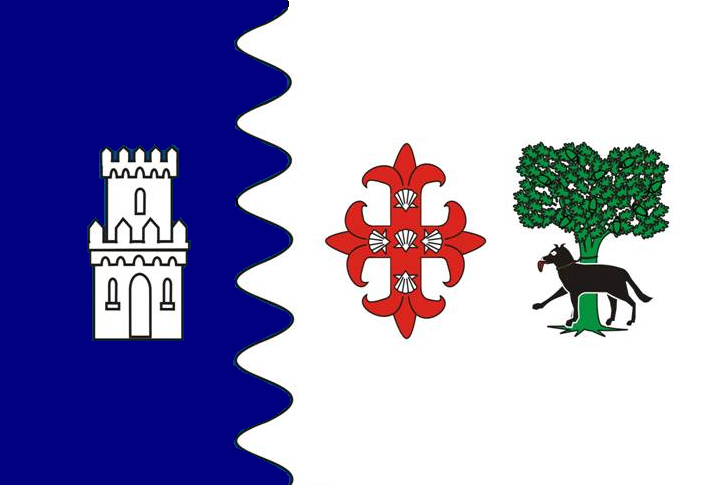 Bandera de Láncara (Lugo)